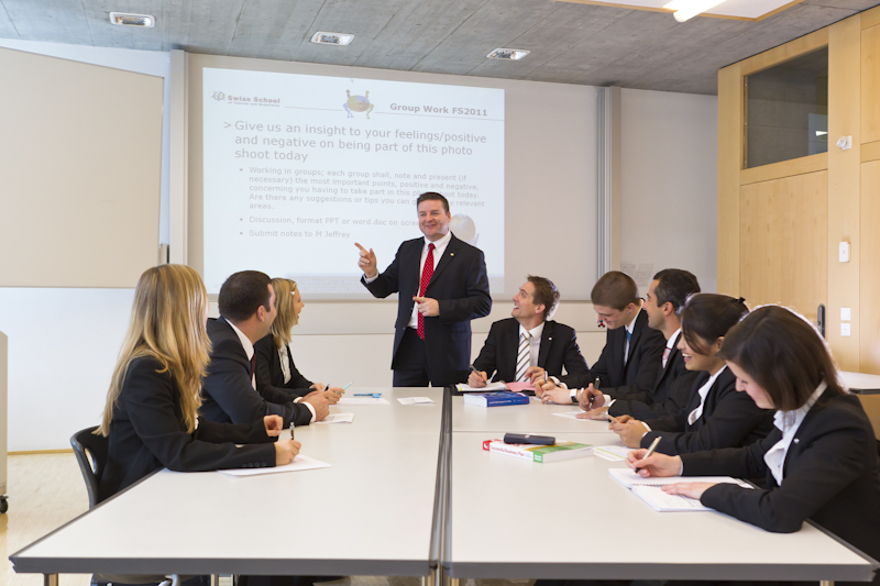 Gruppenprojekte - persönlich und direkt